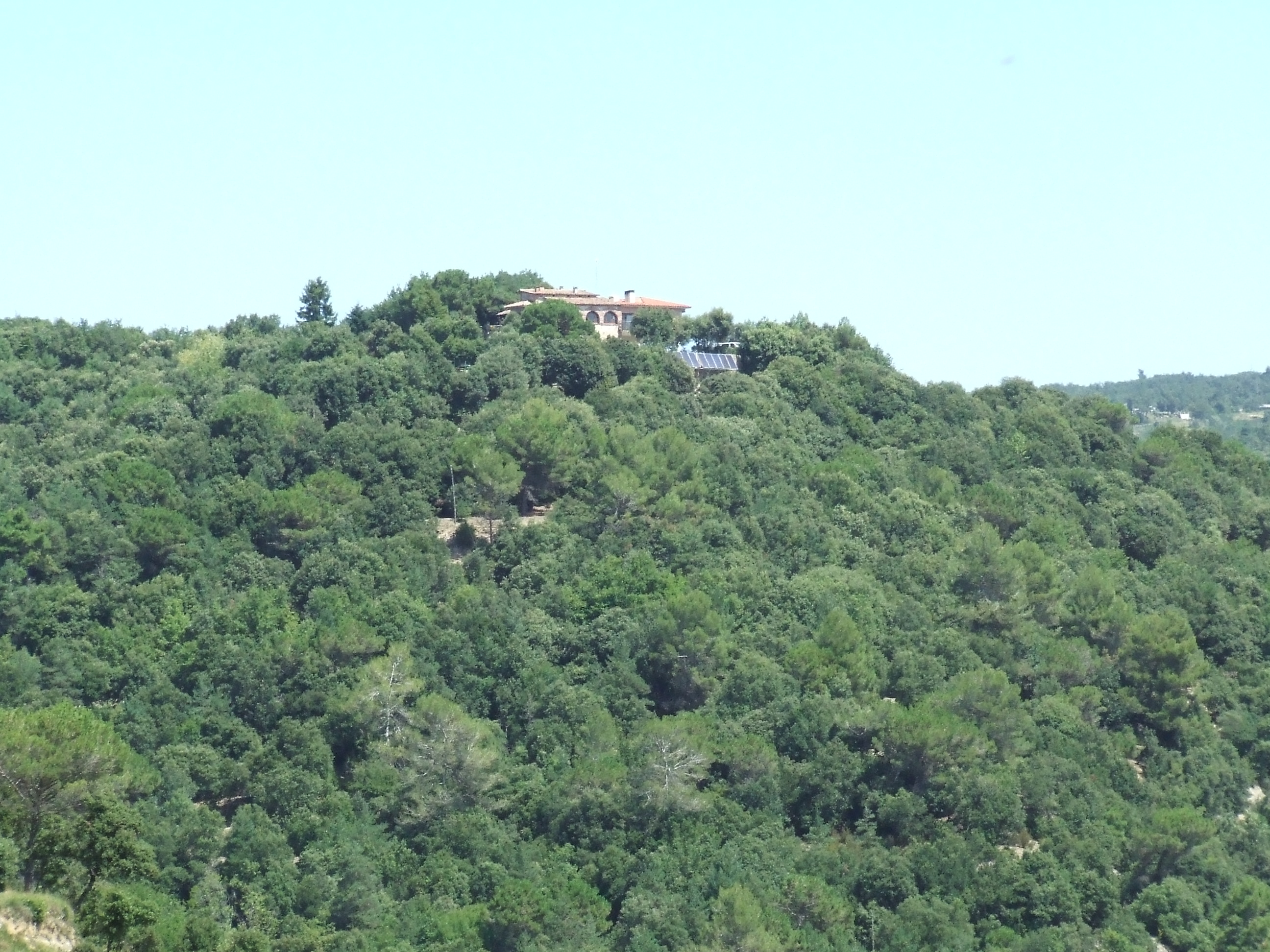 La Torre de Serracaixeta (Santa Coloma Sasserra, Castellcir, Moianès)